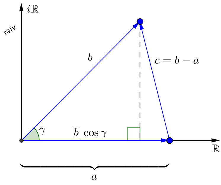 Demostración del Teorema de los Cosenos